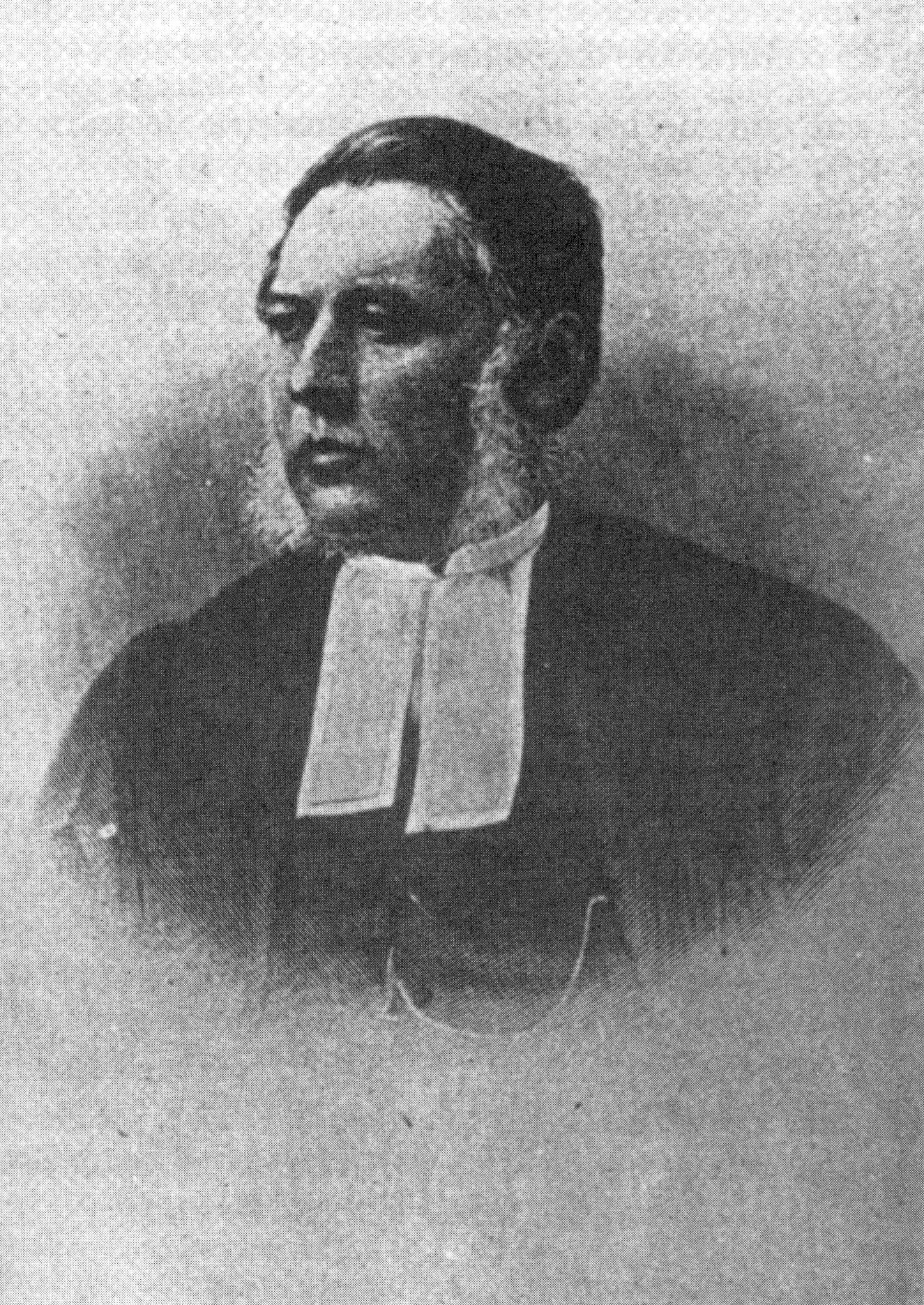 Juge John Campbell Allen